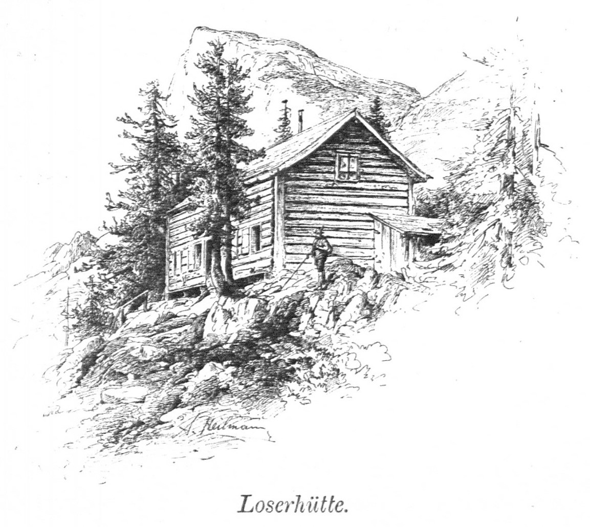 Loserhütte aus Zeitschrift des Deutschen und Oesterreichischen Alpenvereins 1894 Band 25